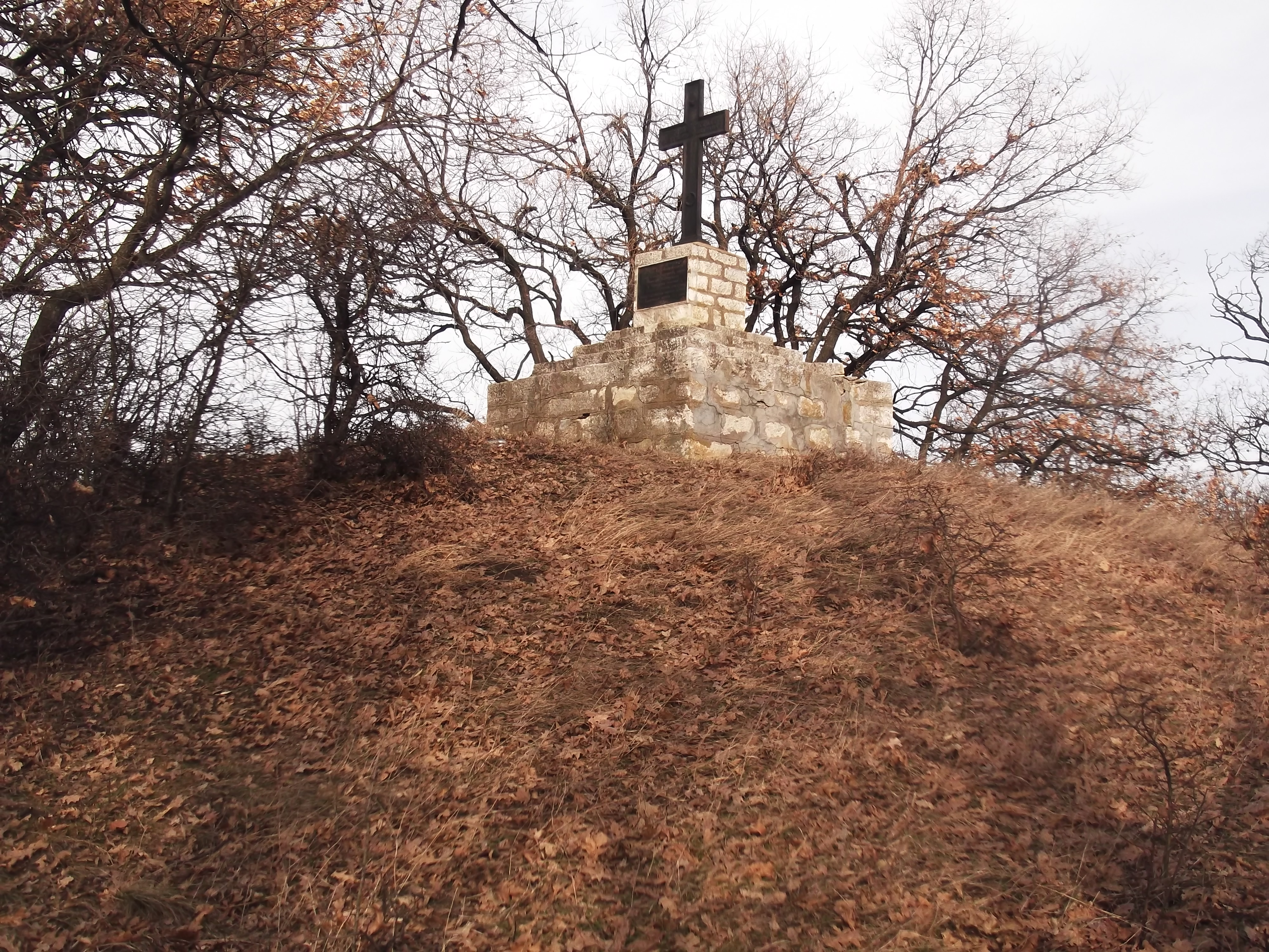 Братска могила на портупей юнкер Михаил Порусенко и 22 нисши чина от 20-ти пехотен Галицки полк, убити на 19 август 1877 г. при защитата на редута край с.Згалево.